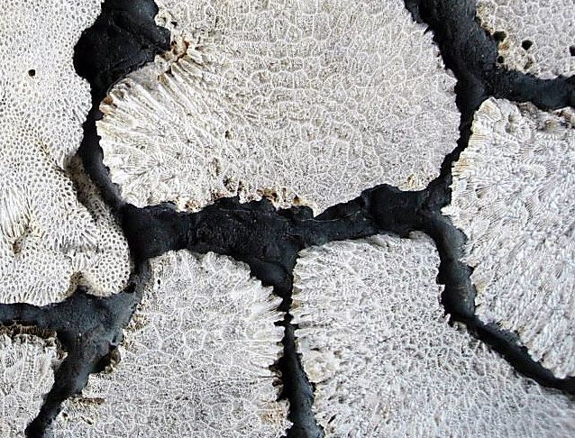 澎湖縣常見的用珊瑚來當牆壁裝飾 photo by prattflora 2005/03